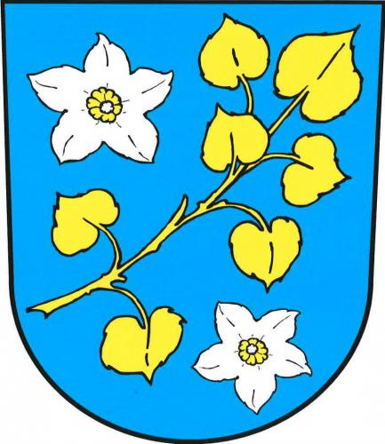 znak, Kochánov, okres Havlíčkův Brod